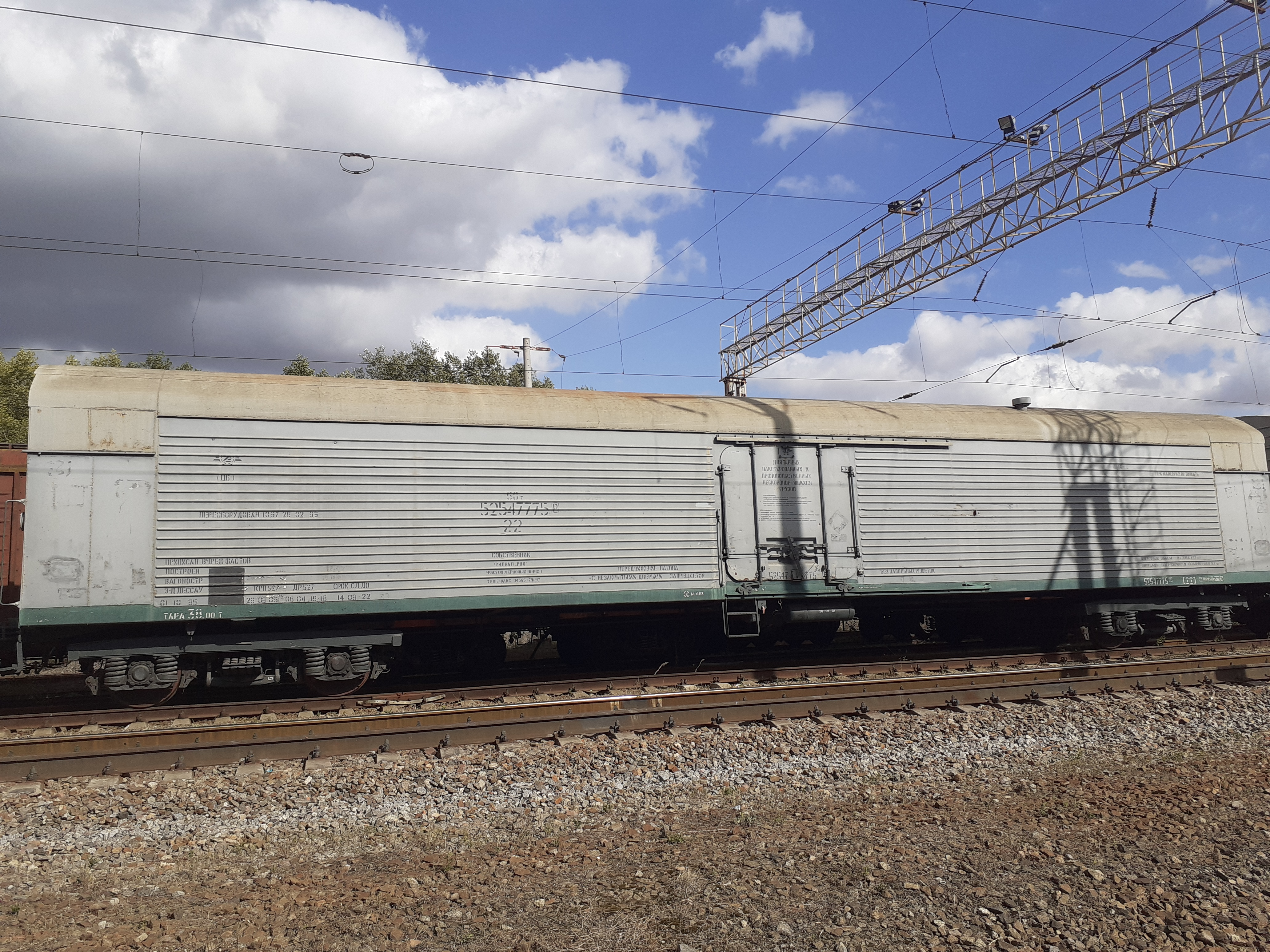 Рефрижераторний вагон німецького заводу Дессау, Полтава, Пост-Ворскла, 2019 р.